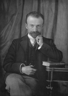 Maurice Blondel vers 1890